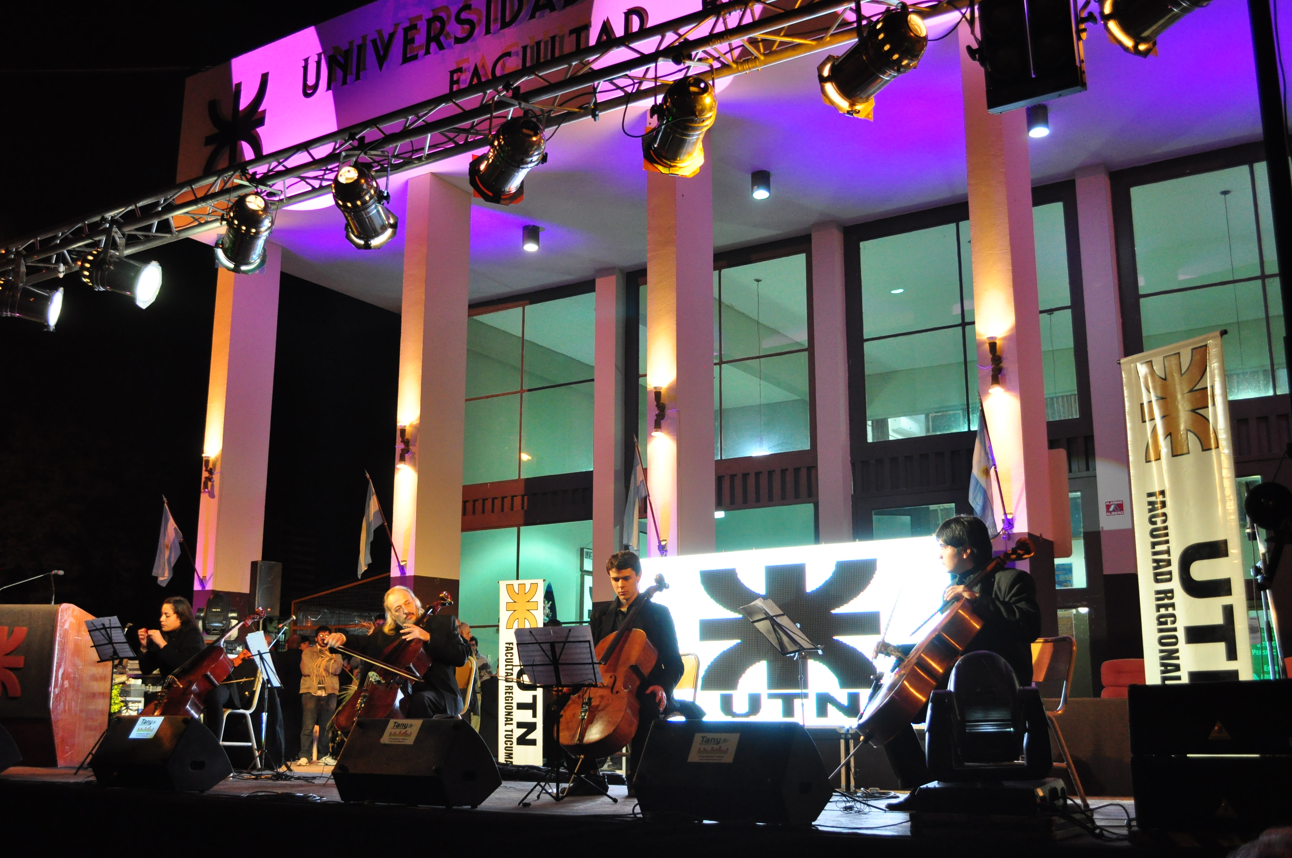 Apertura de la Semana de la Ingeniería 2012